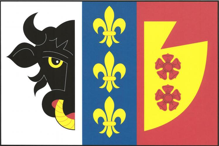 Ostrov, okres Ústí nad Orlicí, vlajka